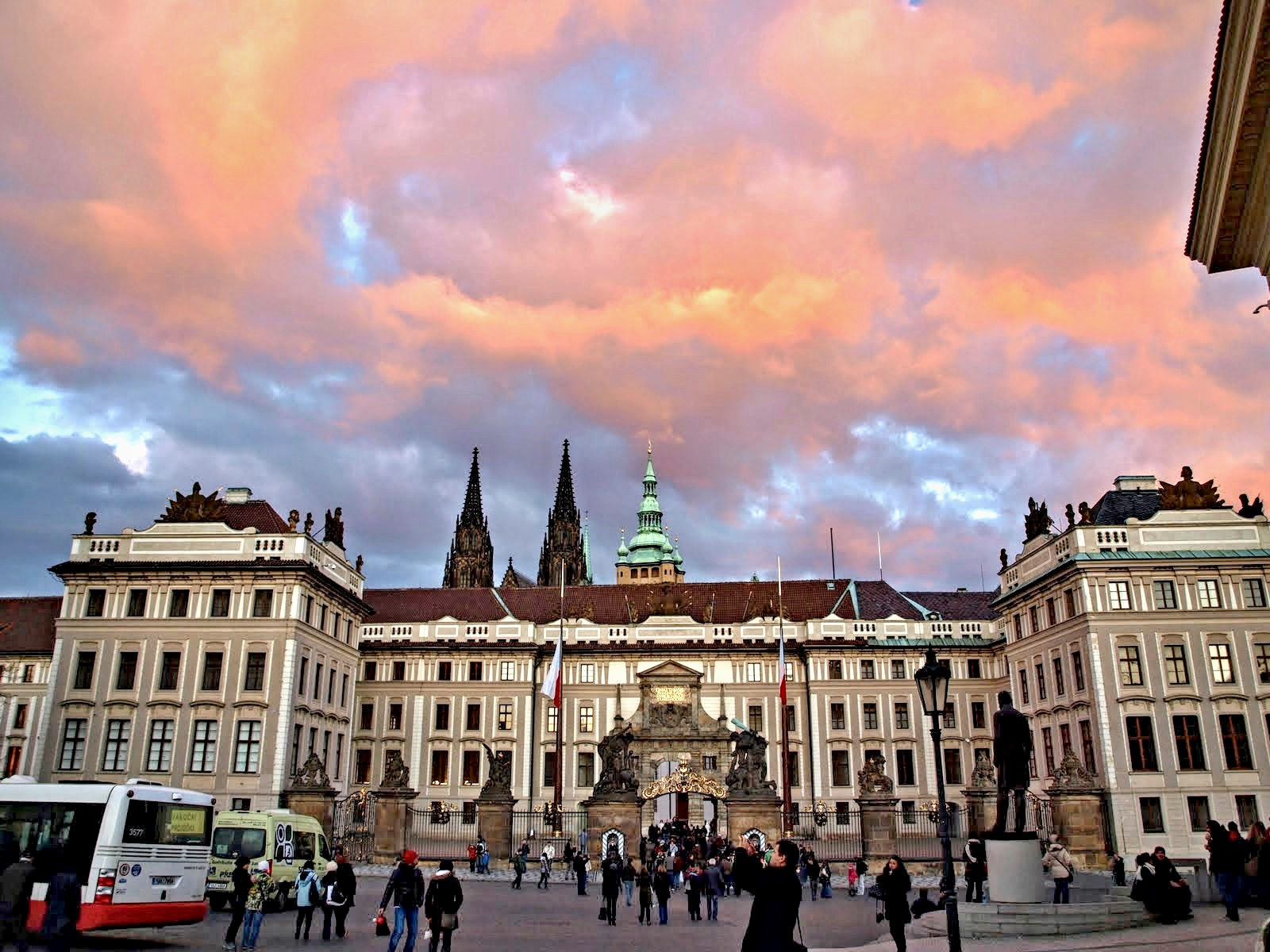 Hradčanské náměstí